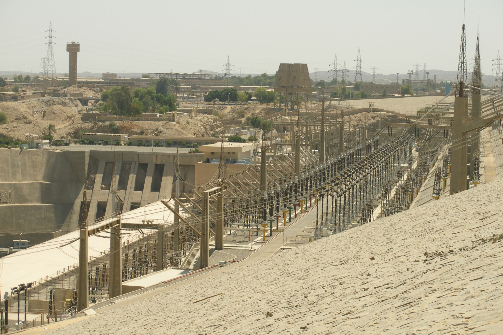 خطوط تنقل طاقة كهربائية من محطة التوليد بالسد العالي أسوان